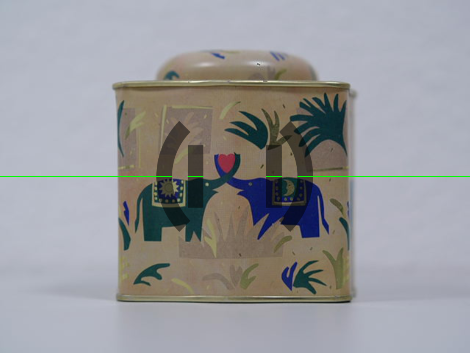 Photographische Live-View-Aufnahme einer Blechdose mit aufgemalten Elephanten mit erweiterter Realität: Ausrichtung mit elektronischer Wasserwaage im Lot: die äußeren Linien zeigen das Rollen um die Längsachse an und die inneren Linien das Nicken um die Querachse.